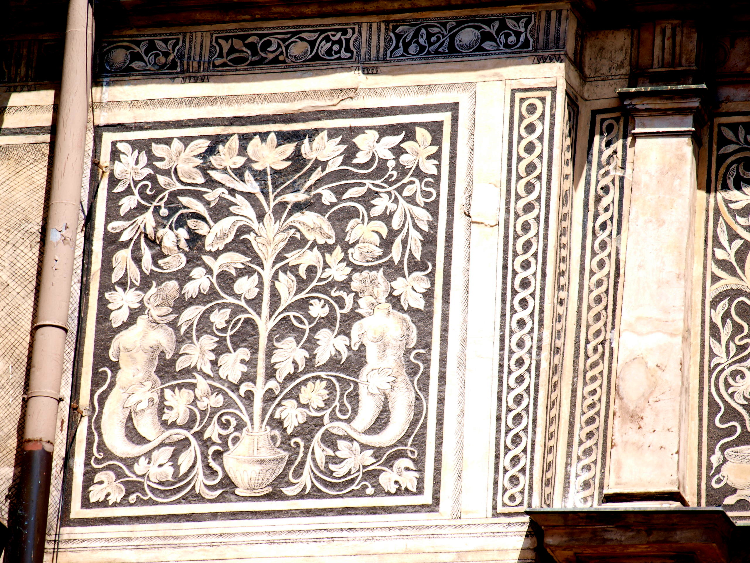 Zámek Nelahozeves